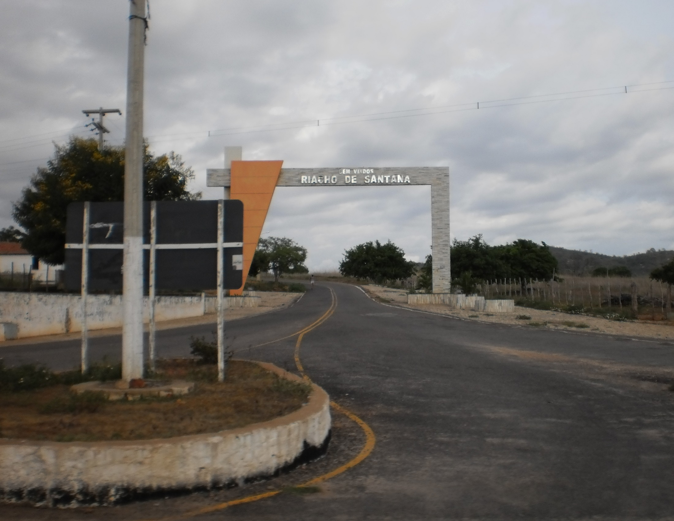 Vista da entrada de Riacho de Santana a partir da RN-073, no cruzamento com a BR-405.